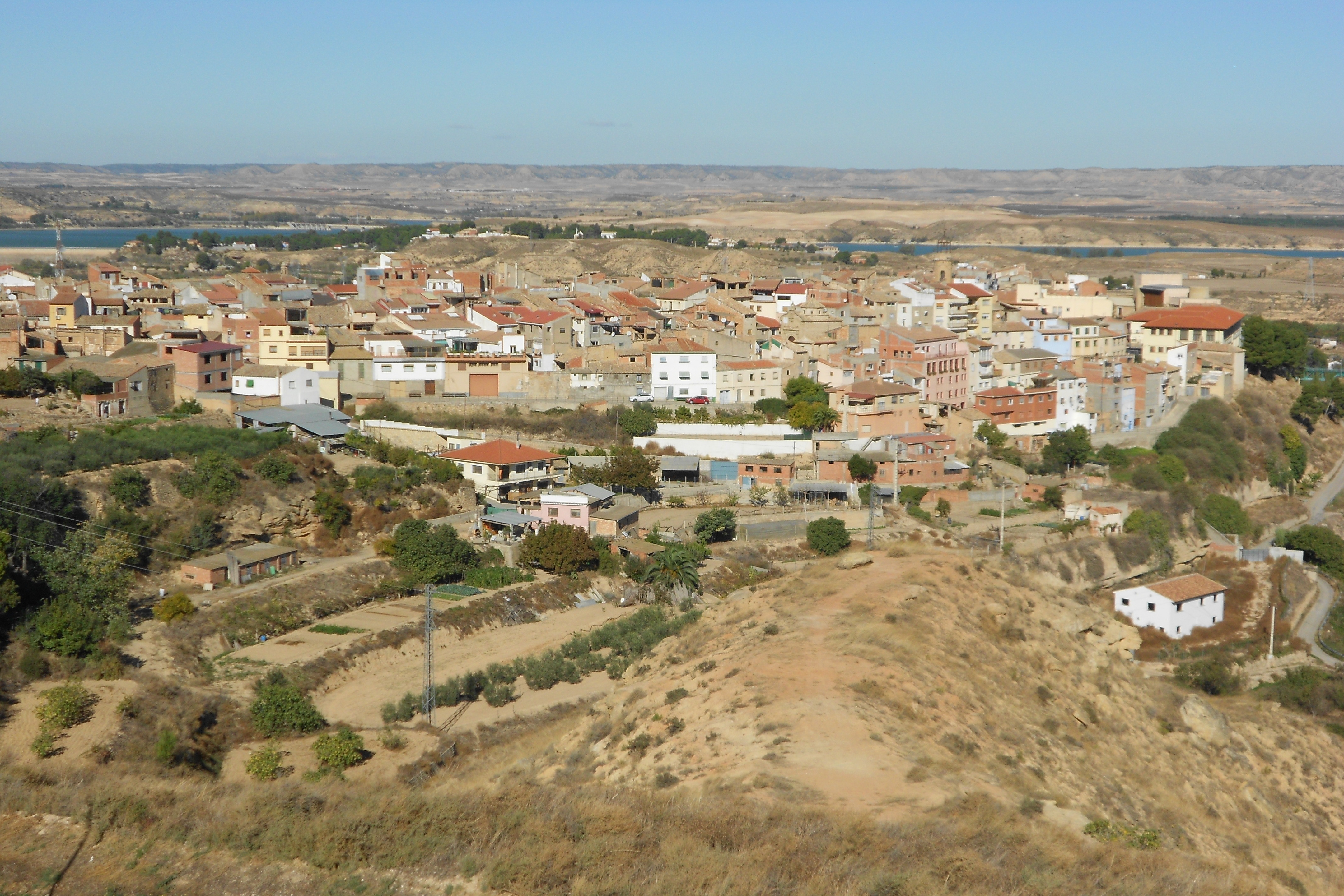 Panorámica de la ciudad de Caspe (Aragón, España)